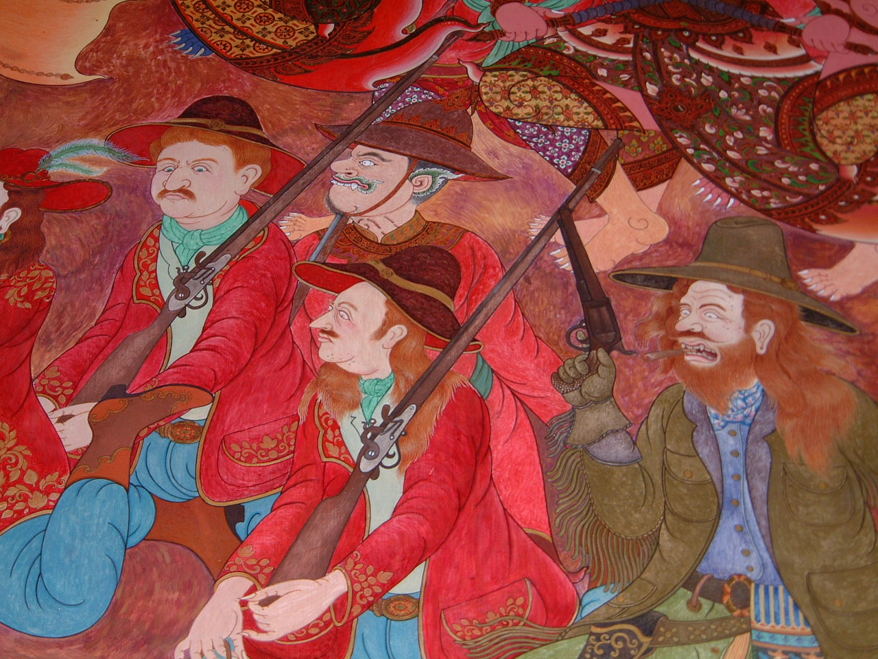 Wat Trithotsathep (วัดตรีทศเทพ วรวิหาร), Bangkok, Thailand